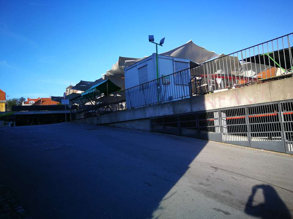 Pogled na tržnico iz Pristaniške ulice